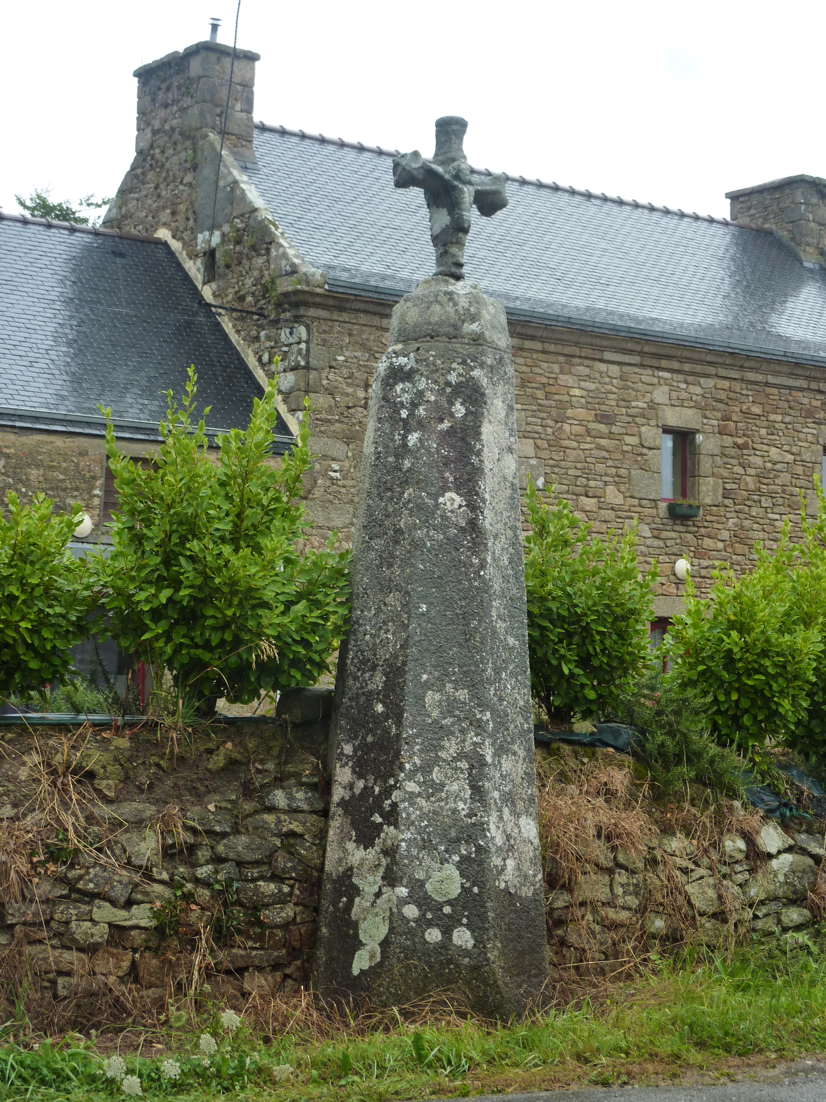 Plouguerneau, Le Grouanec, menhir christianisé.